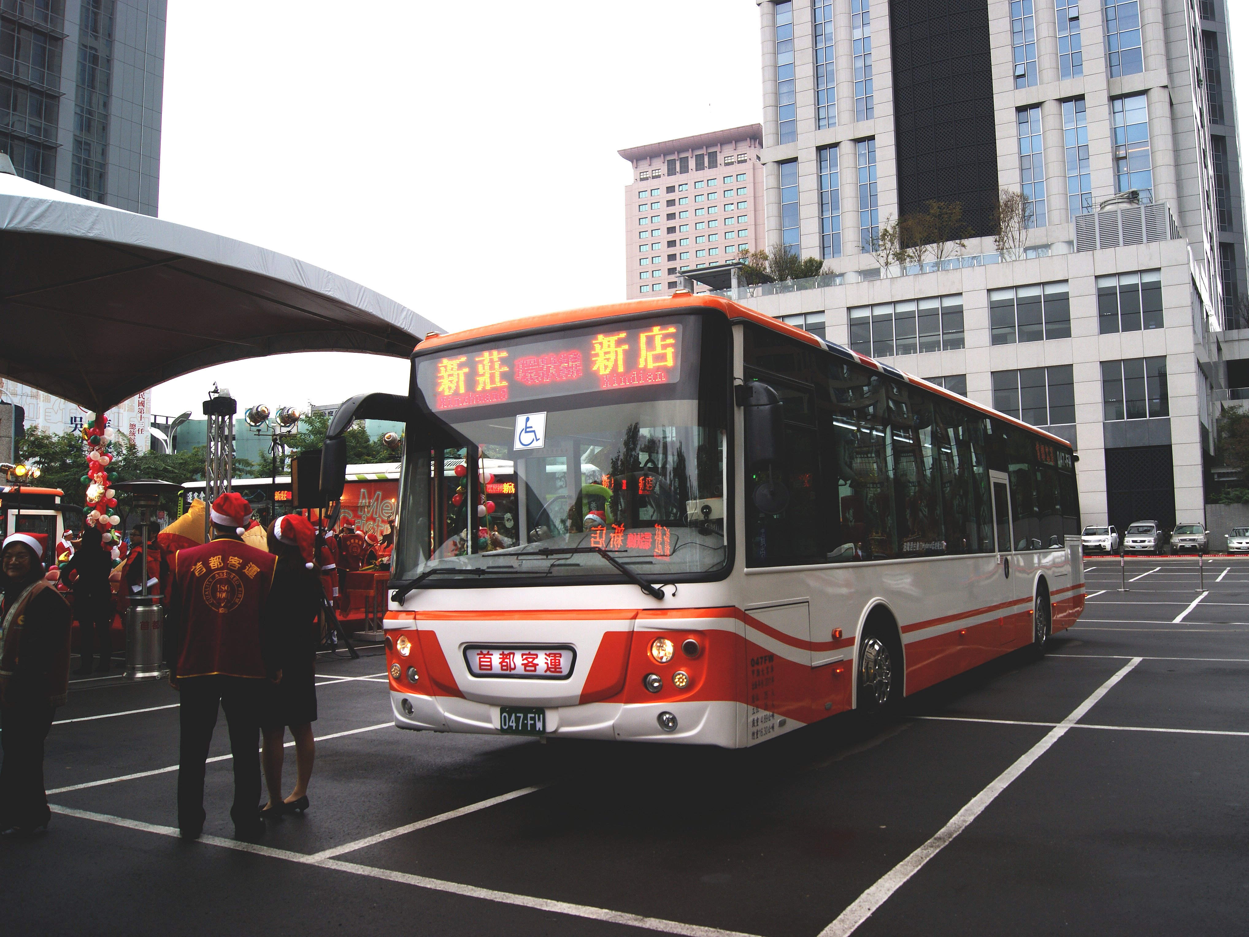 首都客運大客車047-FW行駛台北捷運環狀線先導公車，於板橋公車站靜態展示。